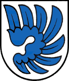 Wappen der politischen Gemeinde Arlesheim, Schweiz